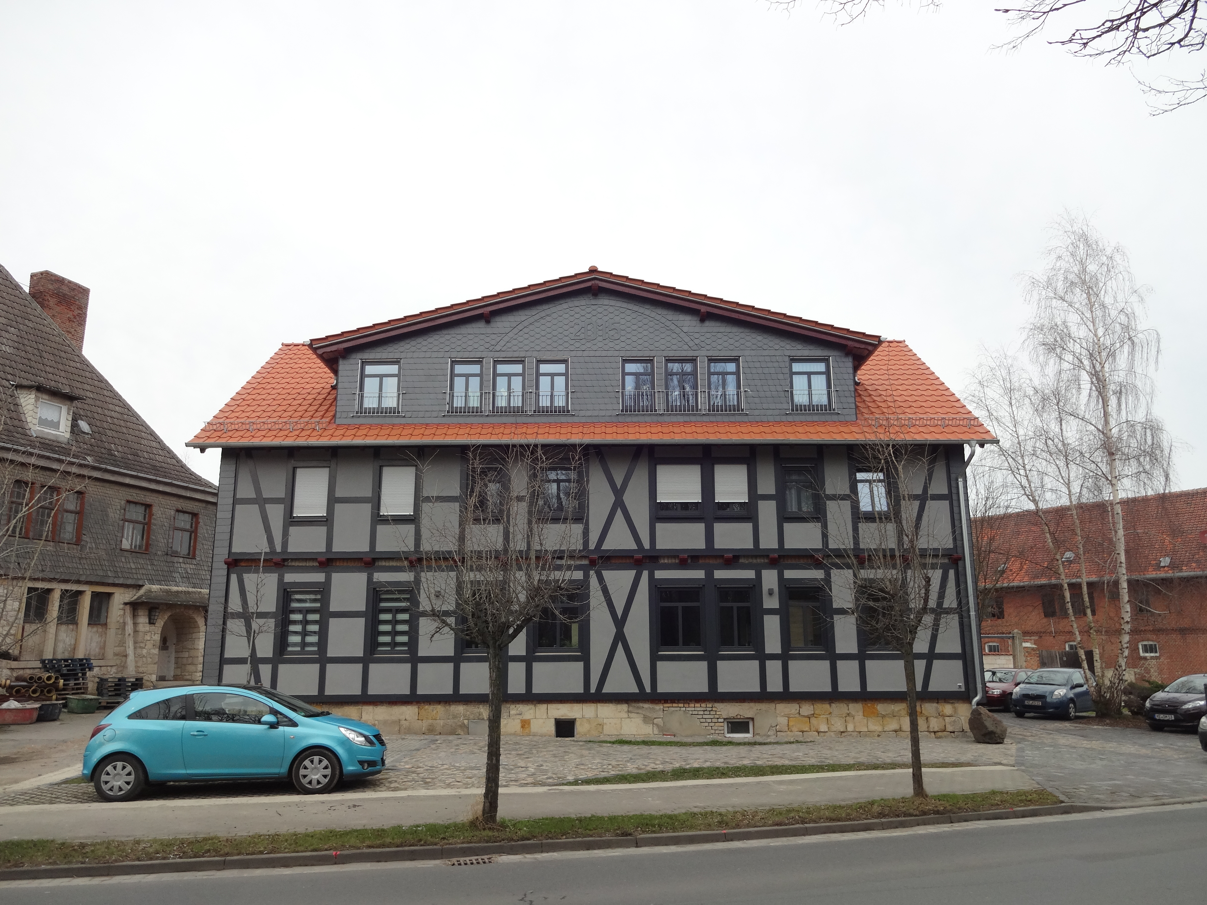 Kulturdenkmal in Derenburg